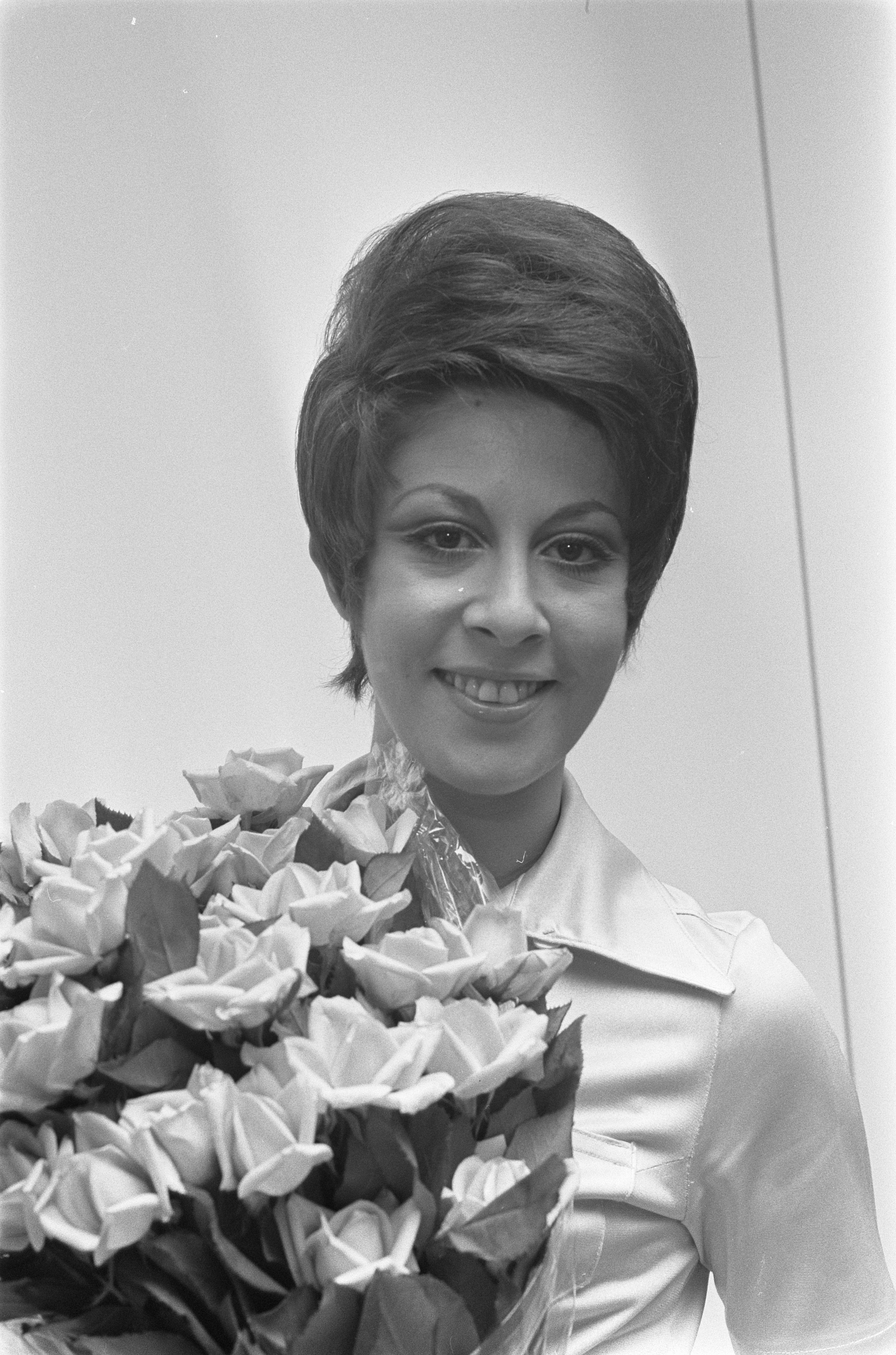 Collectie / Archief : Fotocollectie Anefo Reportage / Serie : [ onbekend ] Beschrijving : Helen Shapiro arriveert op Schiphol; kop Datum : 15 augustus 1969 Trefwoorden : aankomsten Instellingsnaam : Schiphol Fotograaf : Koch, Eric / Anefo Auteursrechthebbende : Nationaal Archief Materiaalsoort : Negatief (zwart/wit) Nummer archiefinventaris : bekijk toegang 2.24.01.05 Bestanddeelnummer : 922-7100